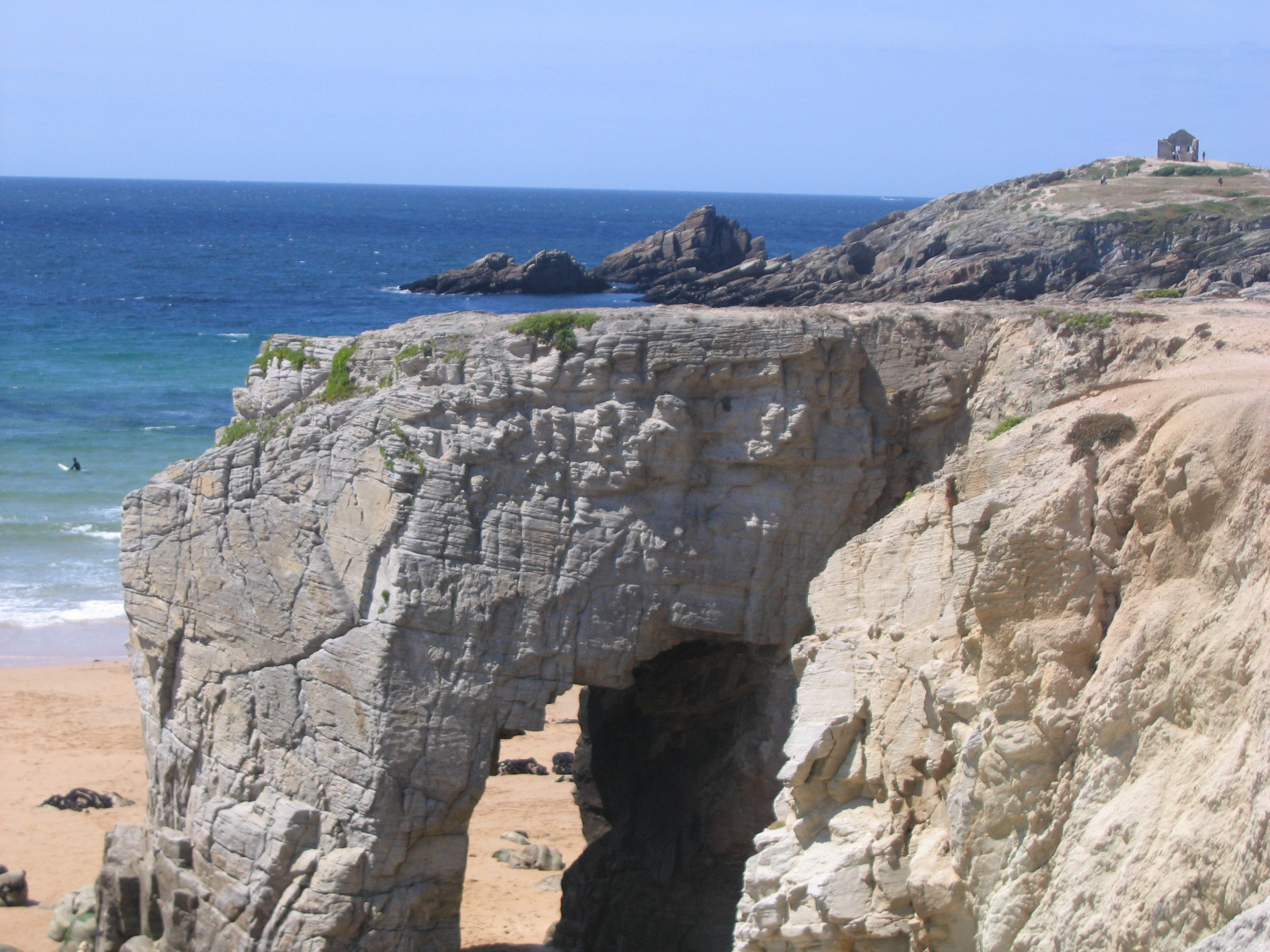 L'arche de Port Blanc et la pointe du Foso